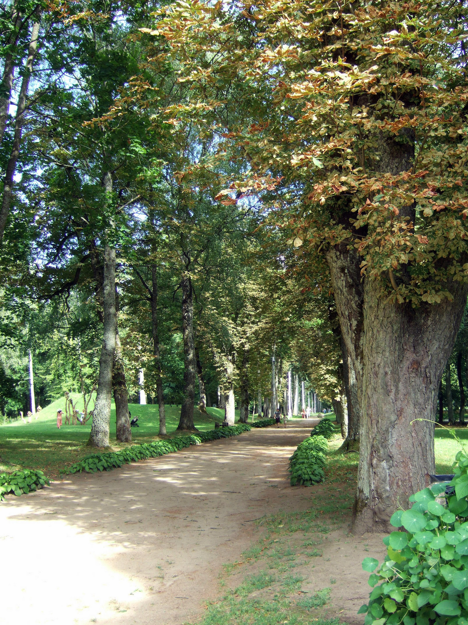 Raudonės pilies parkas